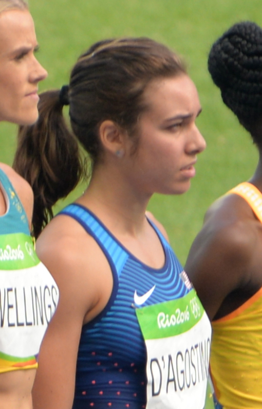 Série du 5000m féminin de Rio 2016